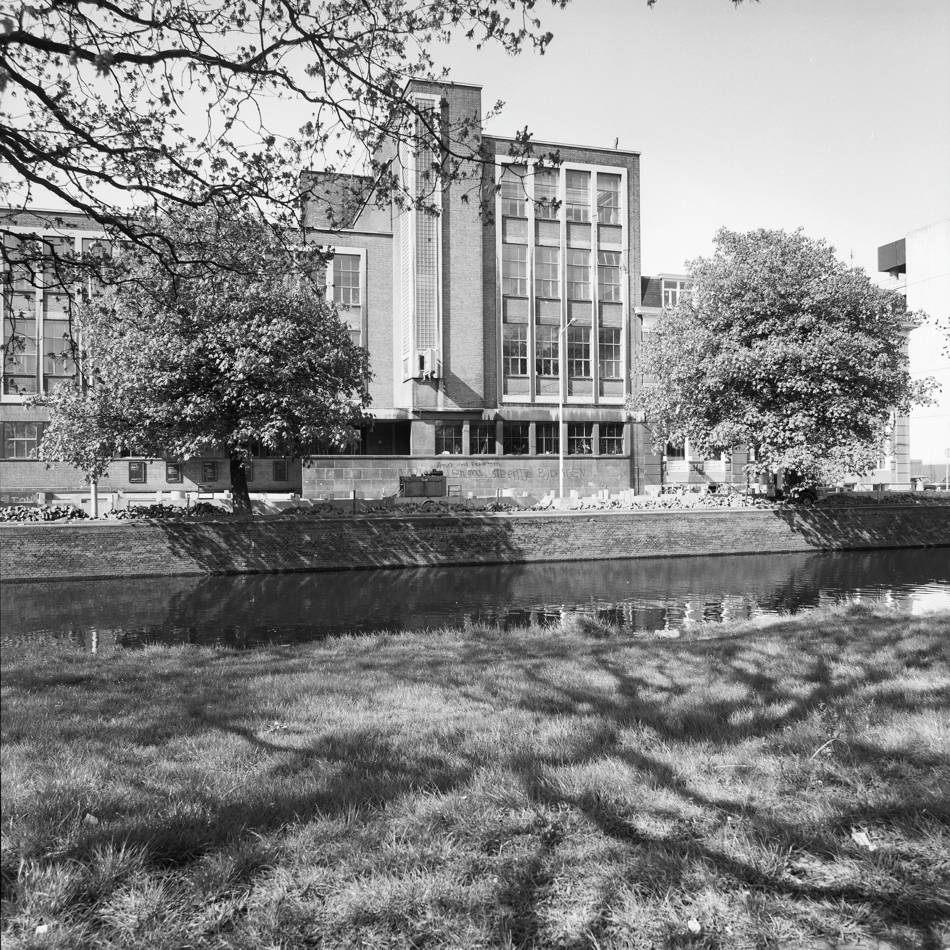 Koninklijke Academie van Beeldende Kunsten: ingangspartij